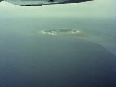 Luchtfoto van Griend, gelegen in de Waddenzee tussen Harlingen en Terschelling.